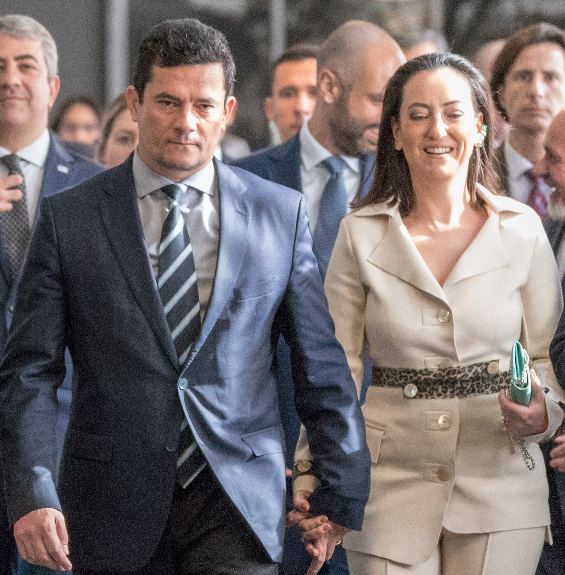 Rosângela e Sergio Moro em junho de 2019.